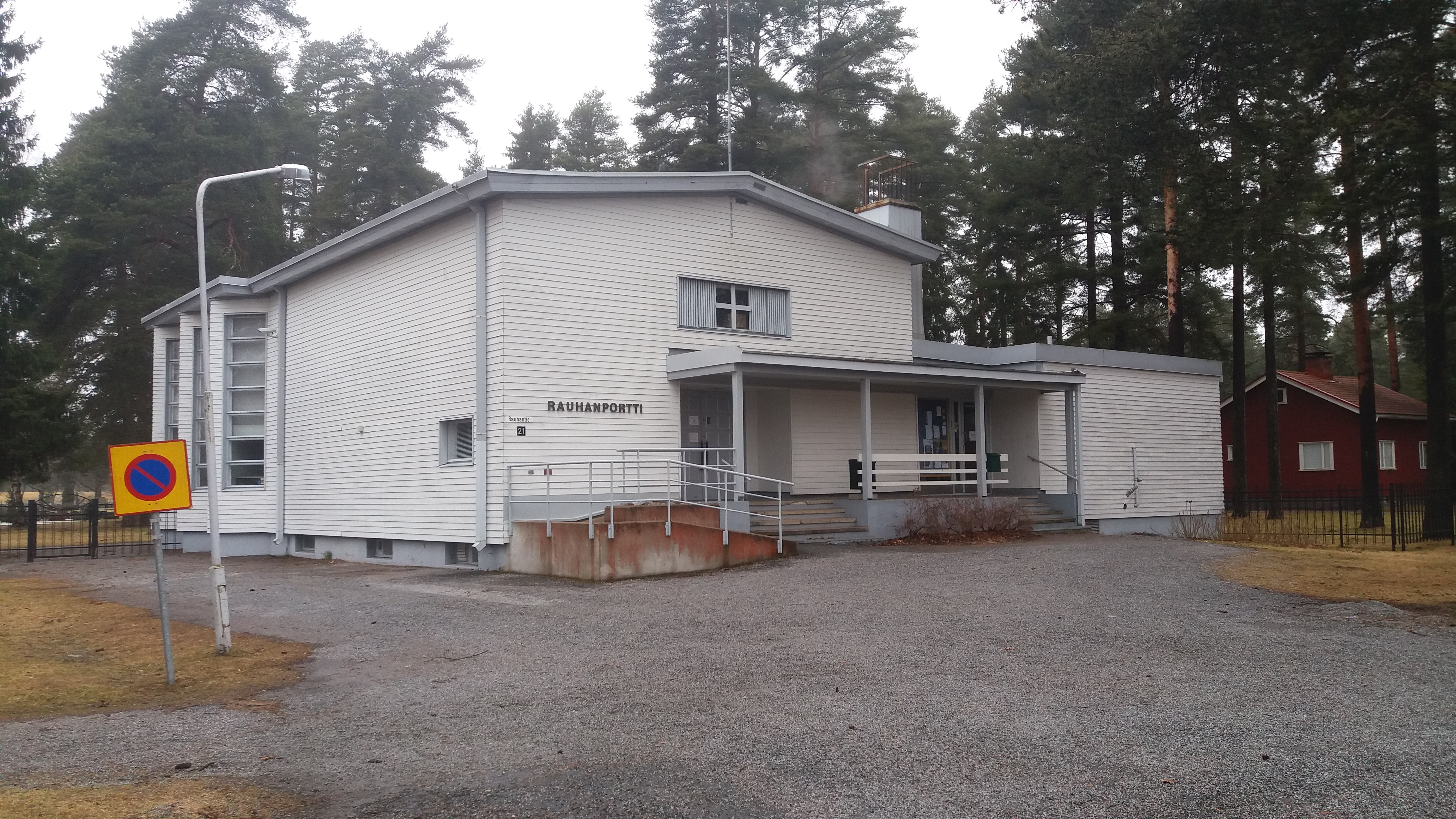 Lamminpään seurakuntakoti Rauhanportti